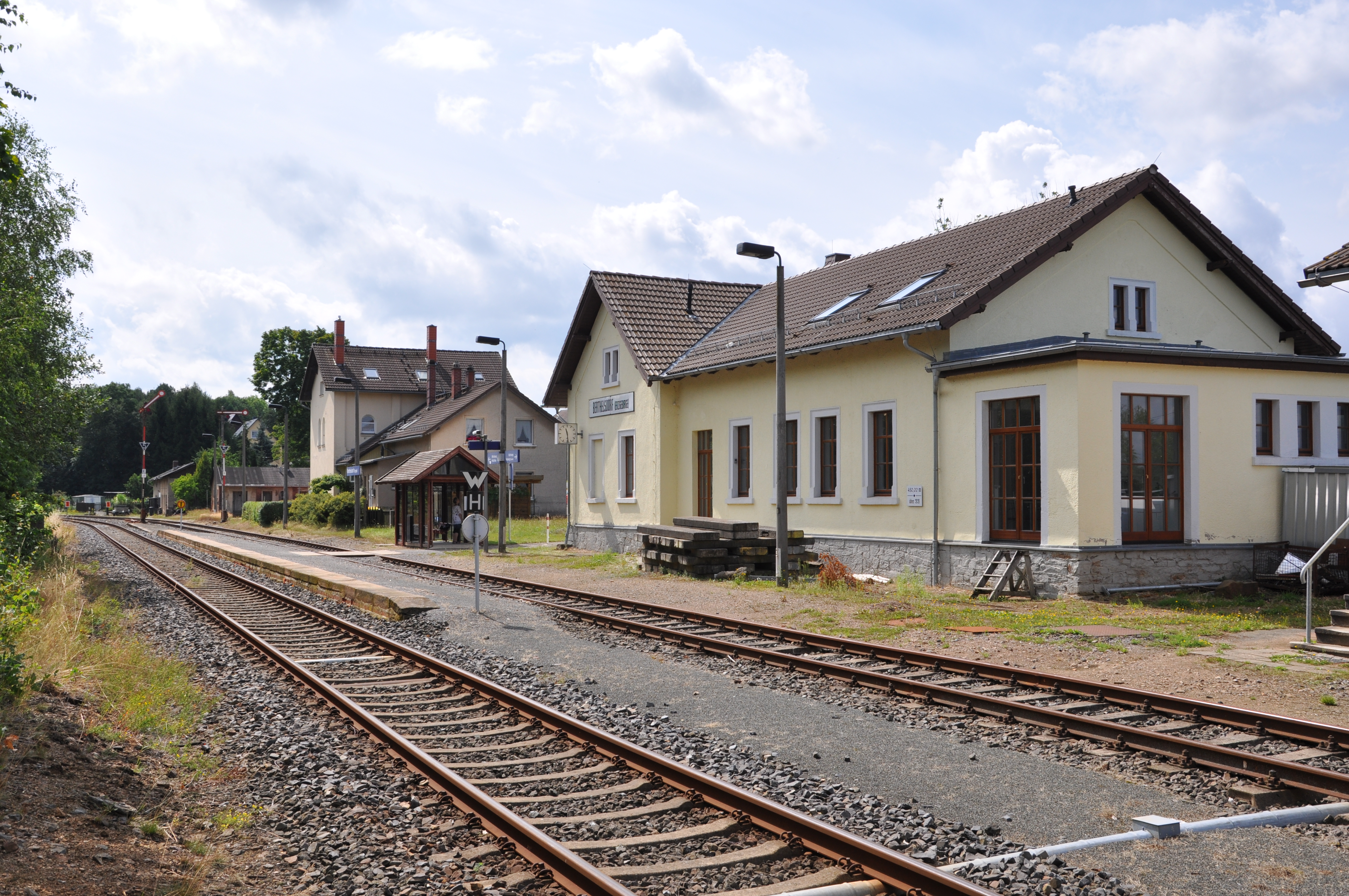 Bahnhof Berthelsdorf (Erzgeb), Moldauer Seite. Zugkreuzungen finden planmäßig nicht statt, die Betriebsstelle ist unbesetzt und in der Verkehrsrichtung Freiberg (Sachs)–Holzhau durchgeschalten.